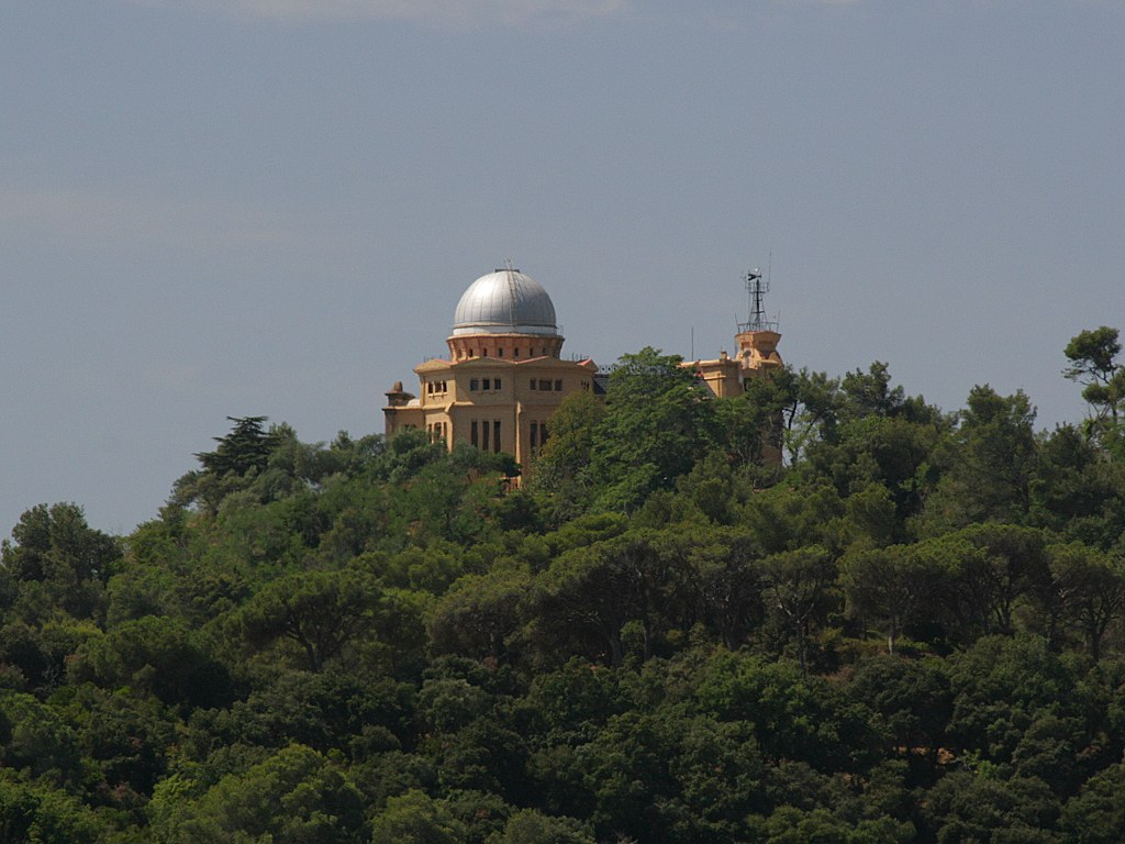 Descripción: Observatorio Fabra Barcelona (Collserola) Fecha: 03/08/2006 Hora: 12:19 Cámara: EOS30D ISO: 400 Tv: 320 Av: 9 Autor: aTarom